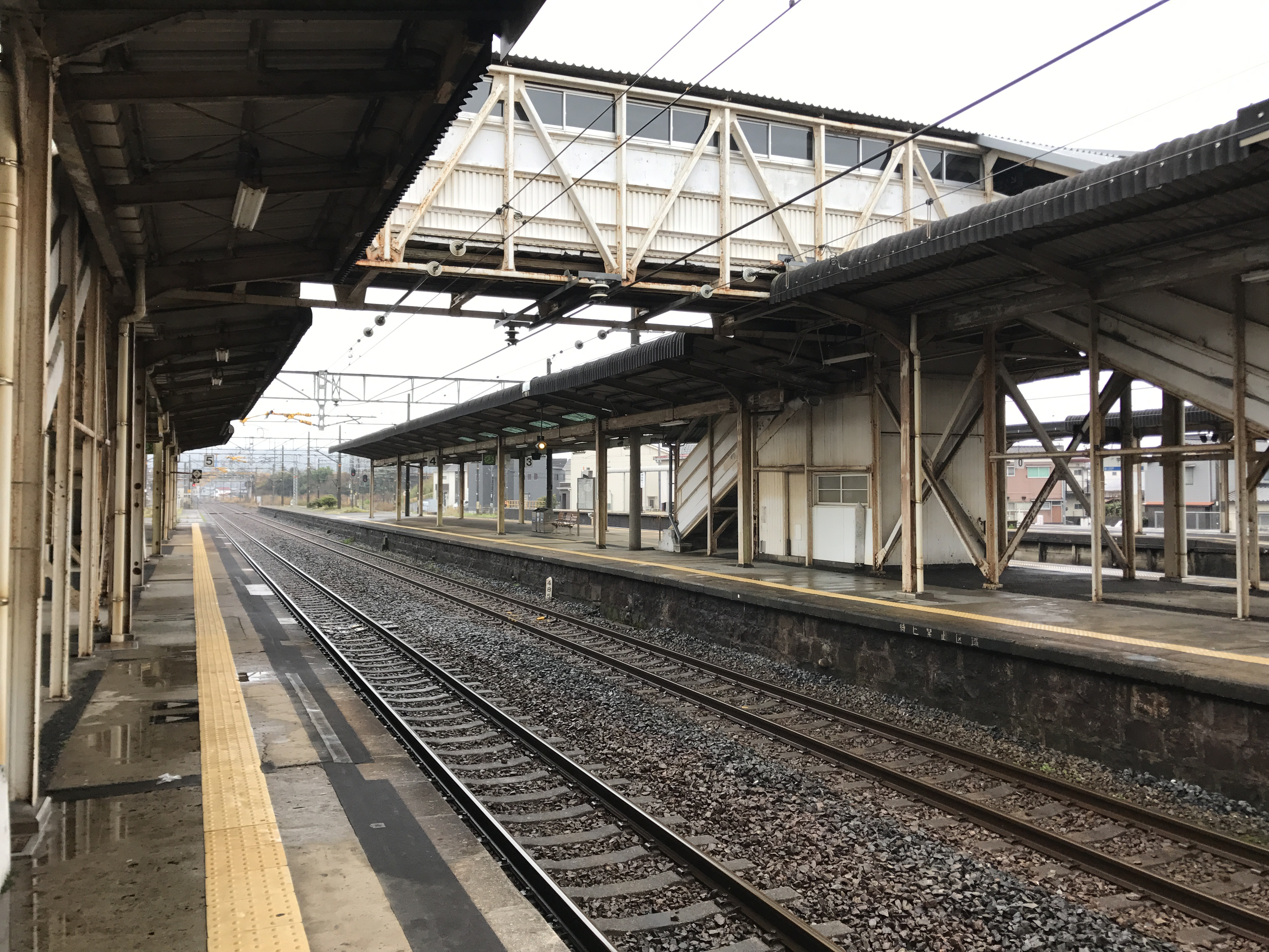 宇部駅構内(5番ホームより。奥は山陽本線・厚東方面)